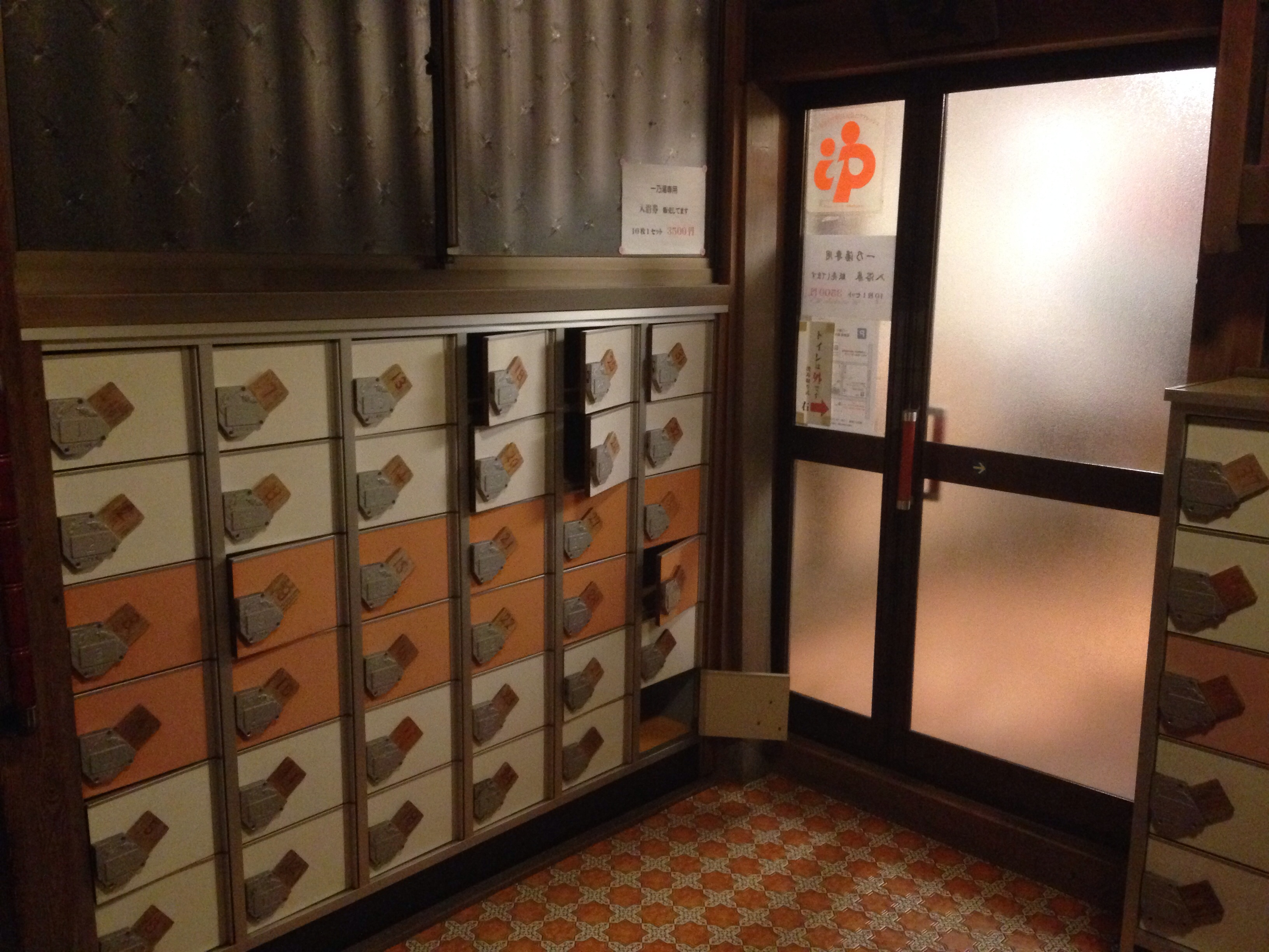 三重県伊賀市の銭湯「一之湯」の下駄箱。